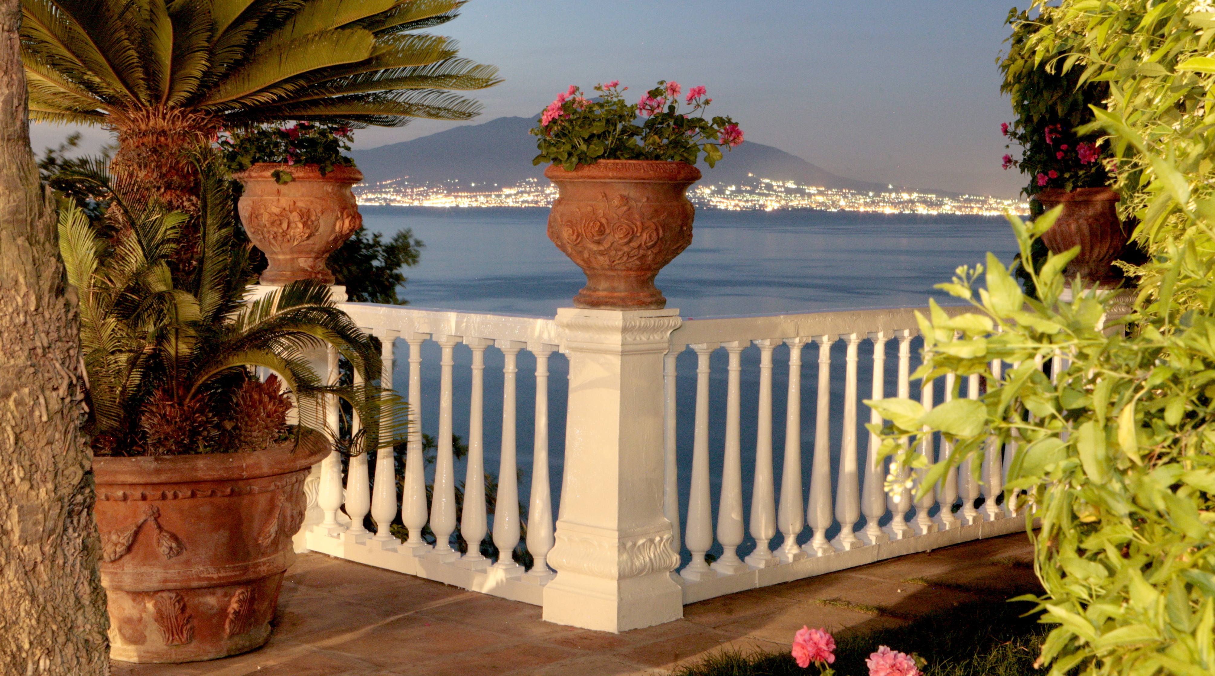 Panorama mozzafiato da dove è possibile ammirare l'incantevole Golfo di Napoli e l'imponente Vesuvio. Le terrazze si sviluppano su tre livelli a picco sul mare, in cima al costone tufaceo che si erge a ridosso del Porto di Sorrento.